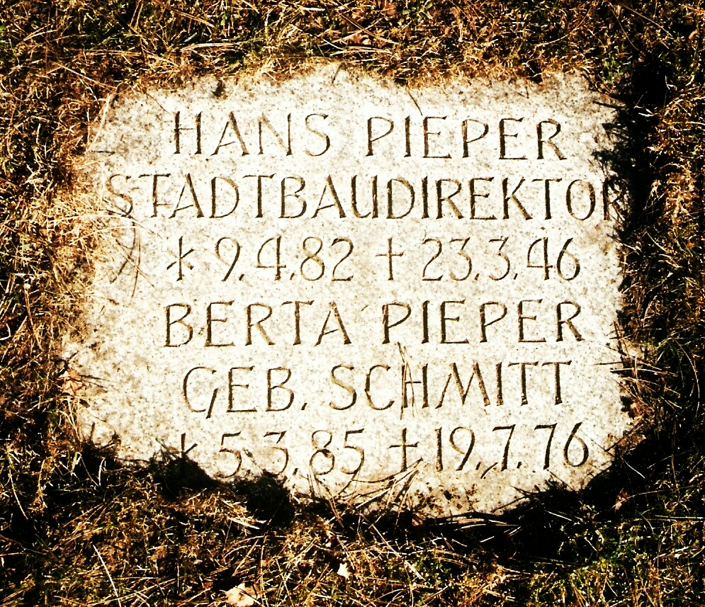 Hans Pieper; Ehrengrab auf dem Vorwerker Friedhof